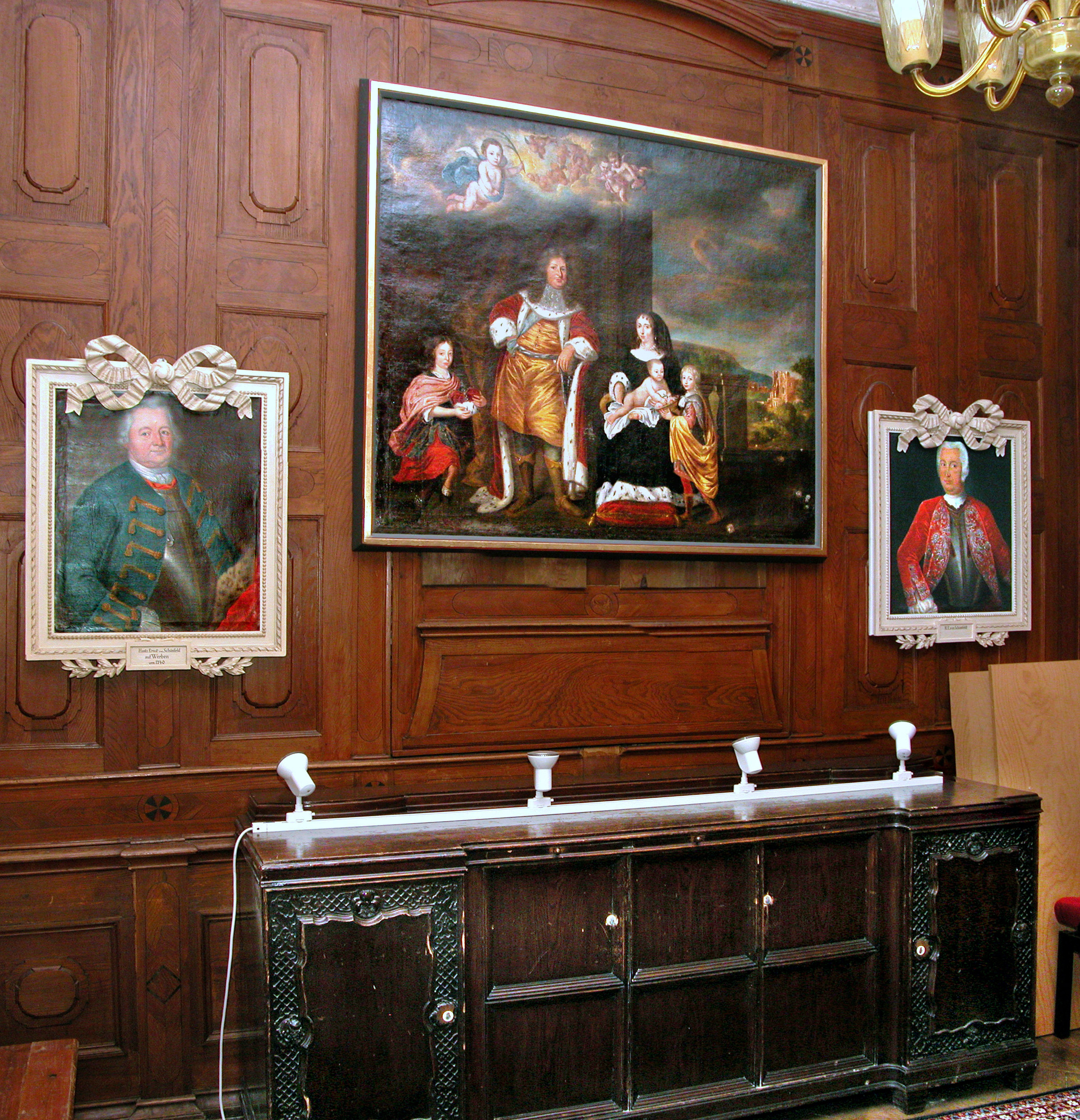 25.06.2004 17495 Karlsburg, Nepziner Weg / Greisfswalder Straße (GMP: 53.970552,13.610214): Barockschloß (1732). Bis 1945 im Besitz der Adelsfamilie von Bismarck-Bohlen und anschließend in der DDR bis 1990 Teil des in Karlsburg ansässigen Zentralinstitutes für Diabetes. Seitdem gehört es dem Land Mecklenburg-Vorpommern und wird durch die Universität Greifswald verwaltet. Hier befinden sich Institute und ein privates Klinikum. Raum westlich vom Festsaal (Vortragssaal) im Erdgeschoß. [DSCN4174+4175.JPG]20040625150MDR.JPG(c)Blobelt